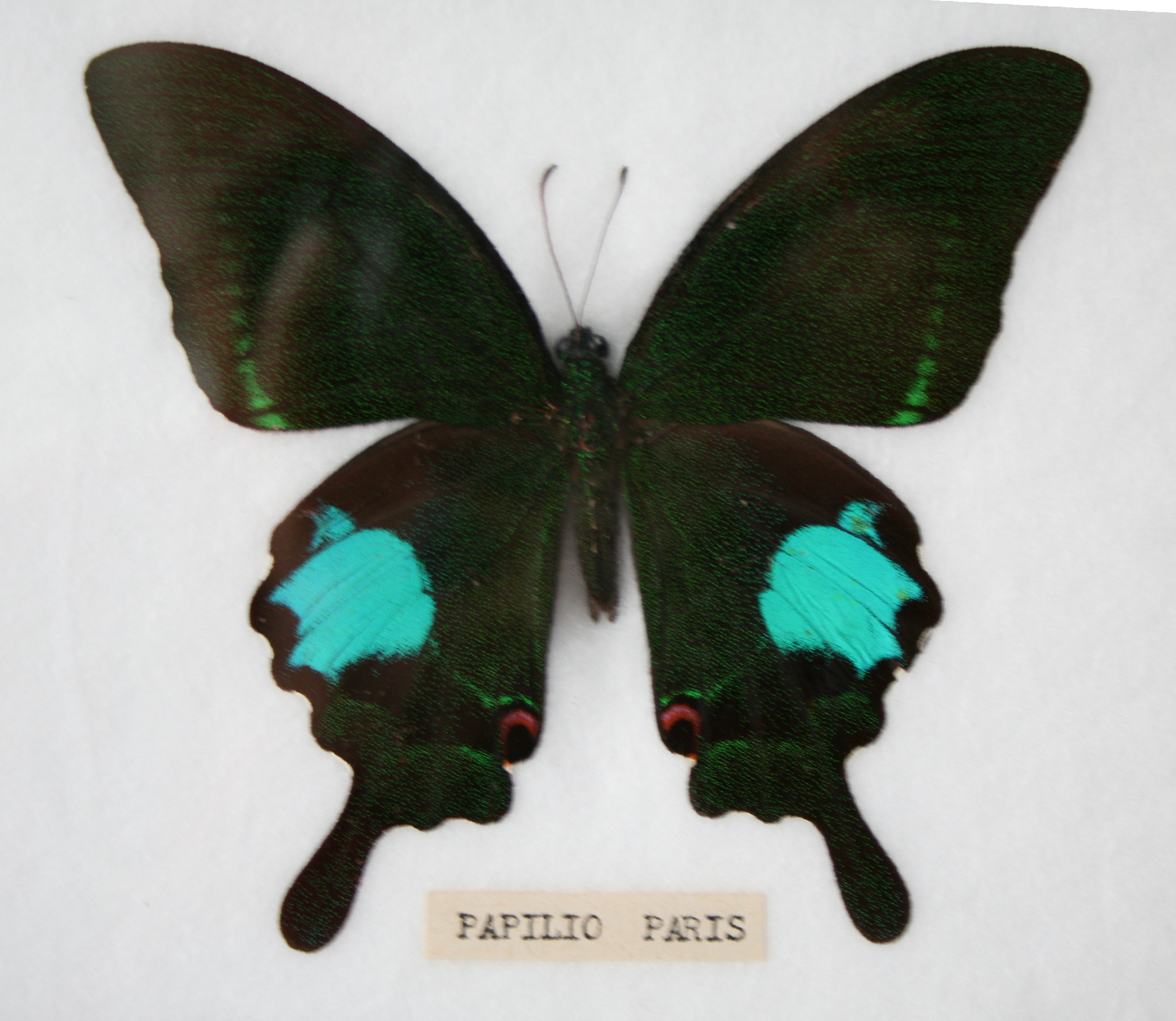 Papilio paris Papillon embaumé dans un cadre sous verre. Provenance : Thaïlande, années 90.